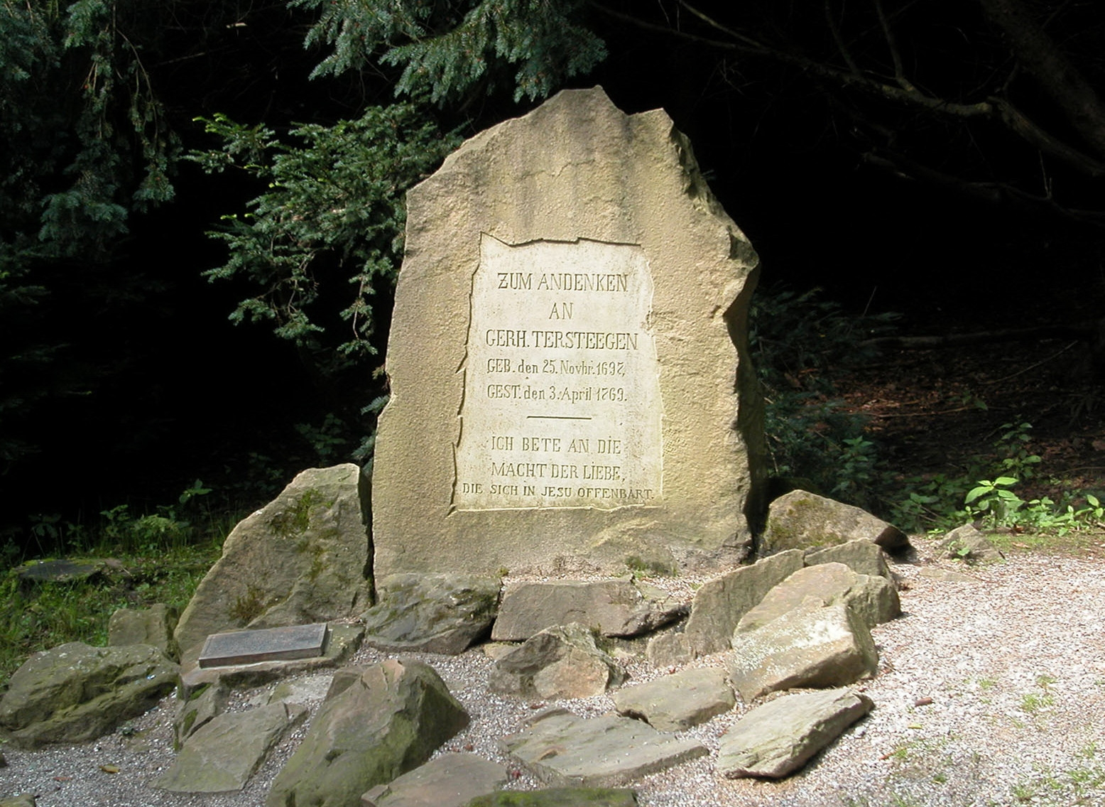 Tersteegen-Denkmal in Mülheim an der Ruhr Standort:51°24′50.4″N 6°53′52.3″E / 51.414°N 6.897861°E